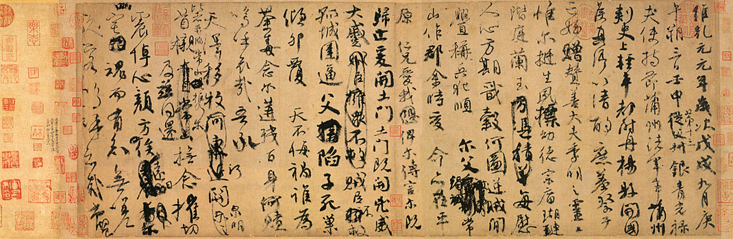 唐朝颜真卿行书《祭姪文稿》小全幅。